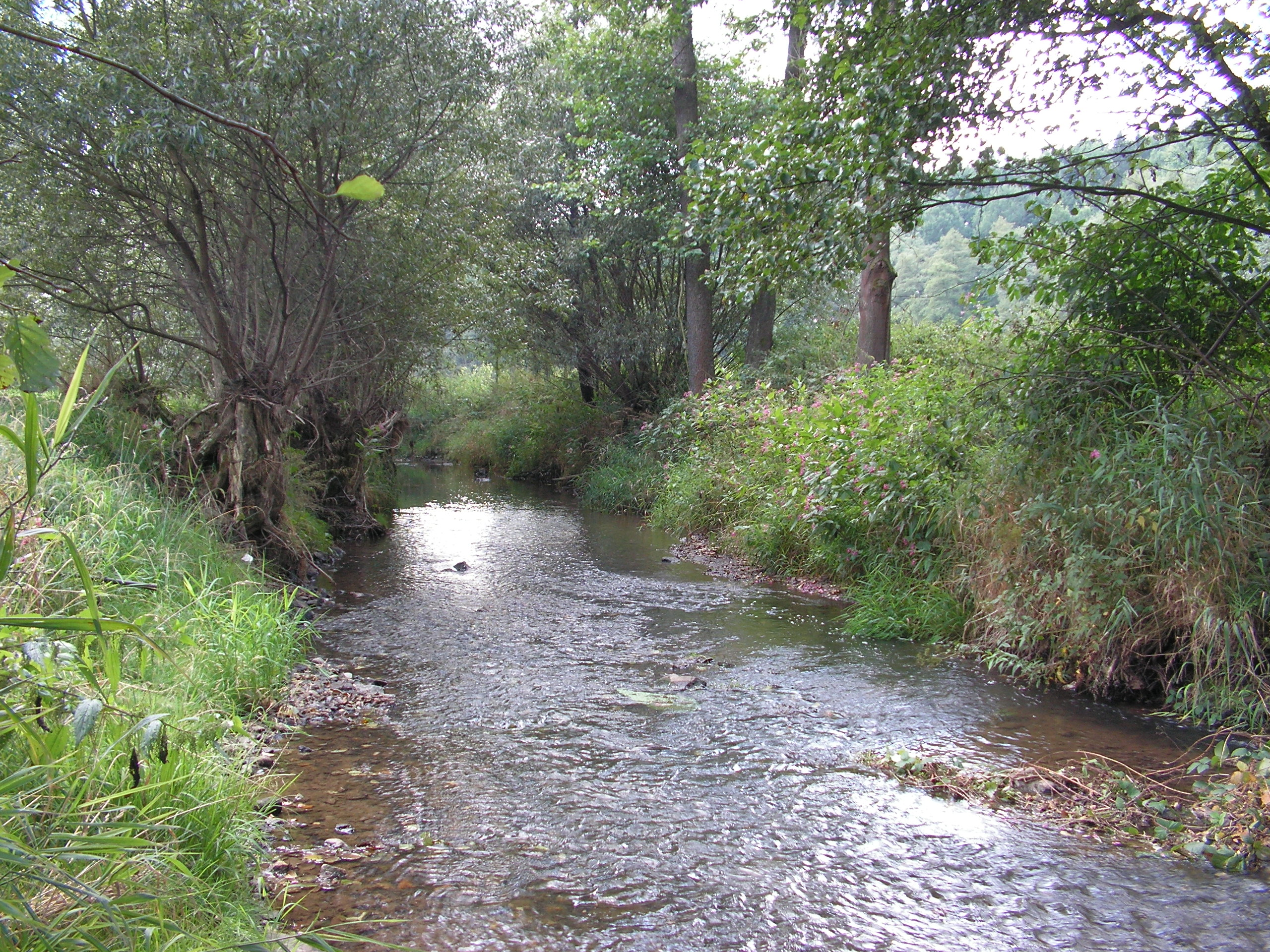 Říčka Sázavka na 2,30 říčním kilometru. Pohled po proudu od silničního mostu.